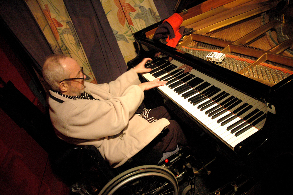 Per Henrik Wallin spelar hos Kulturförening Tellus, Midsommarkransen, Stockholm den 23 april 2005.